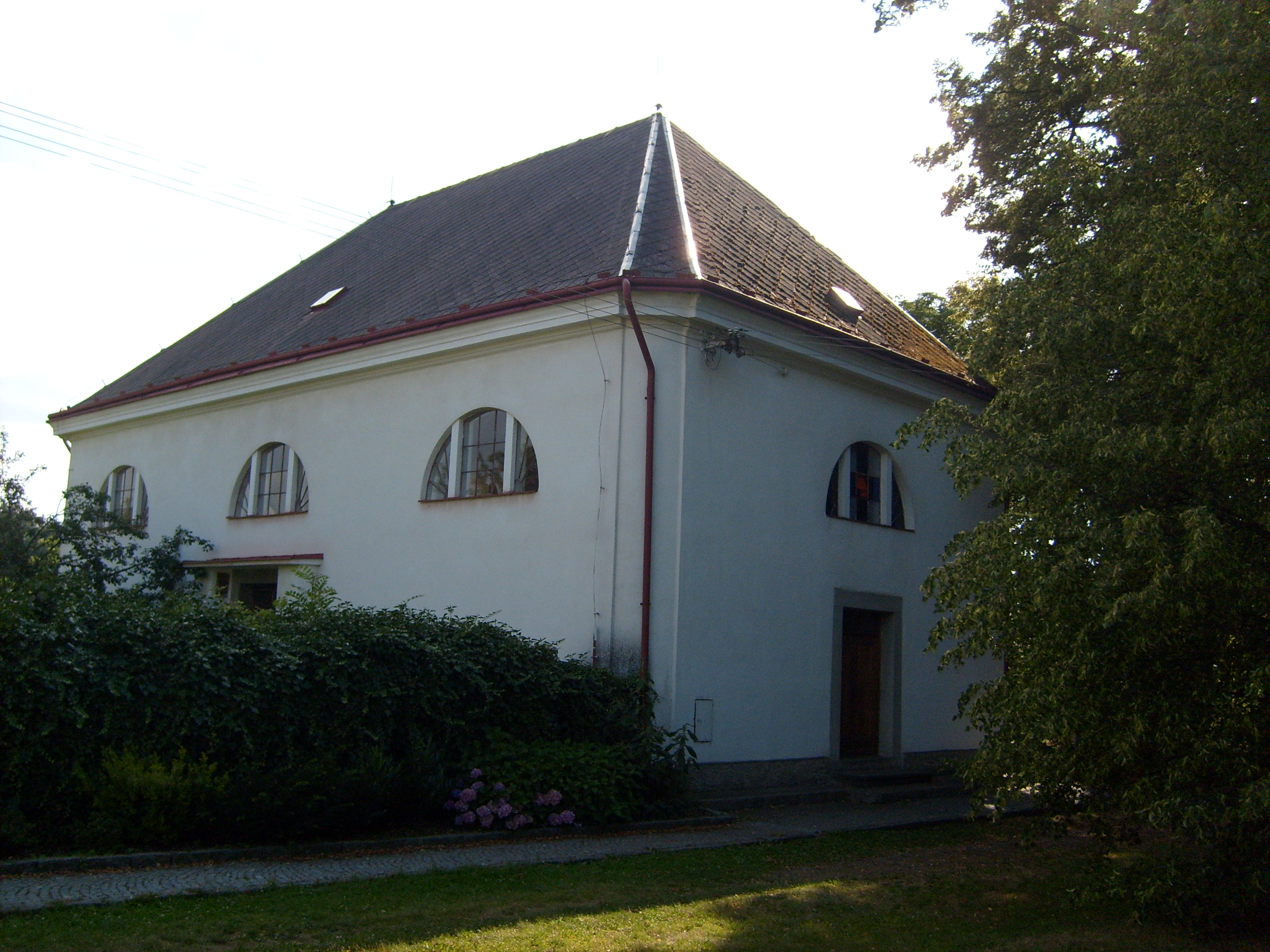 Evangelický toleranční kostel, Hradiště, České Lhotice, Pardubice Region, Czech Republic